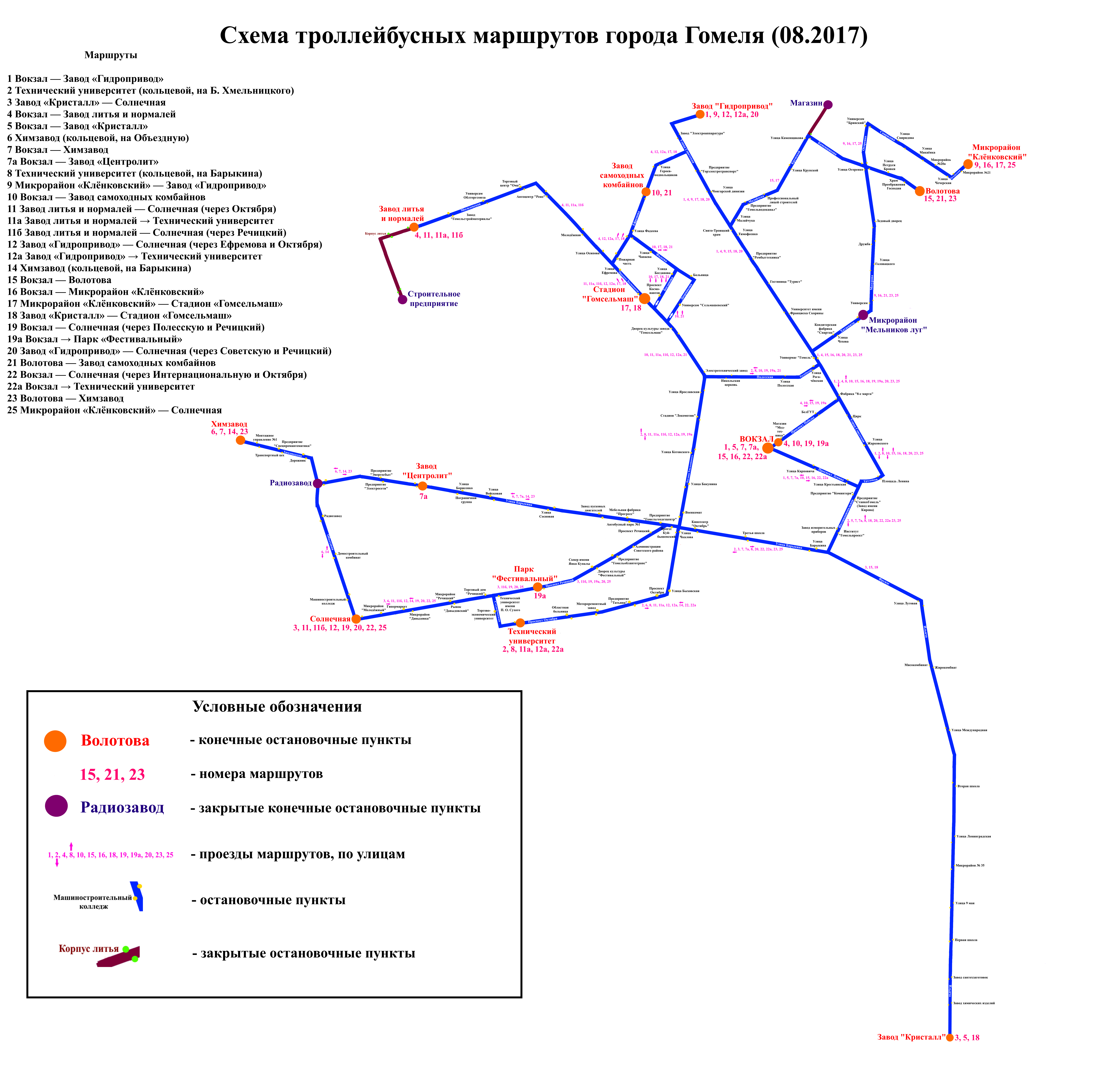 Схема троллейбусных маршрутов Гомеля (08.2017)